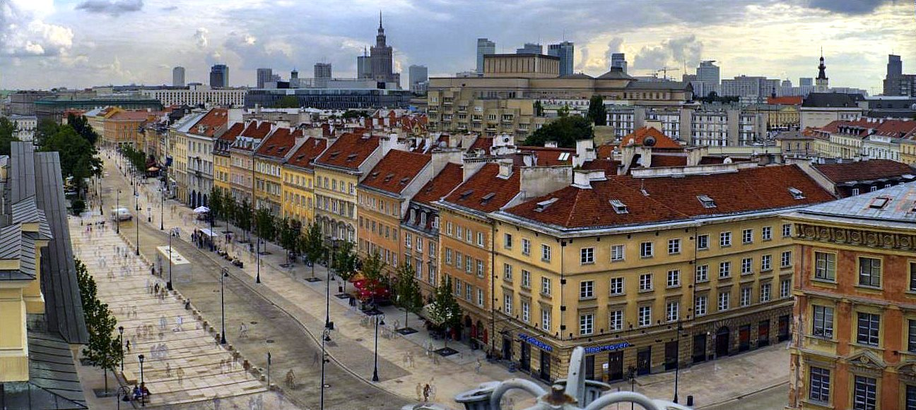 Widok na ulice Krakowskie Przedmiescie po remoncie